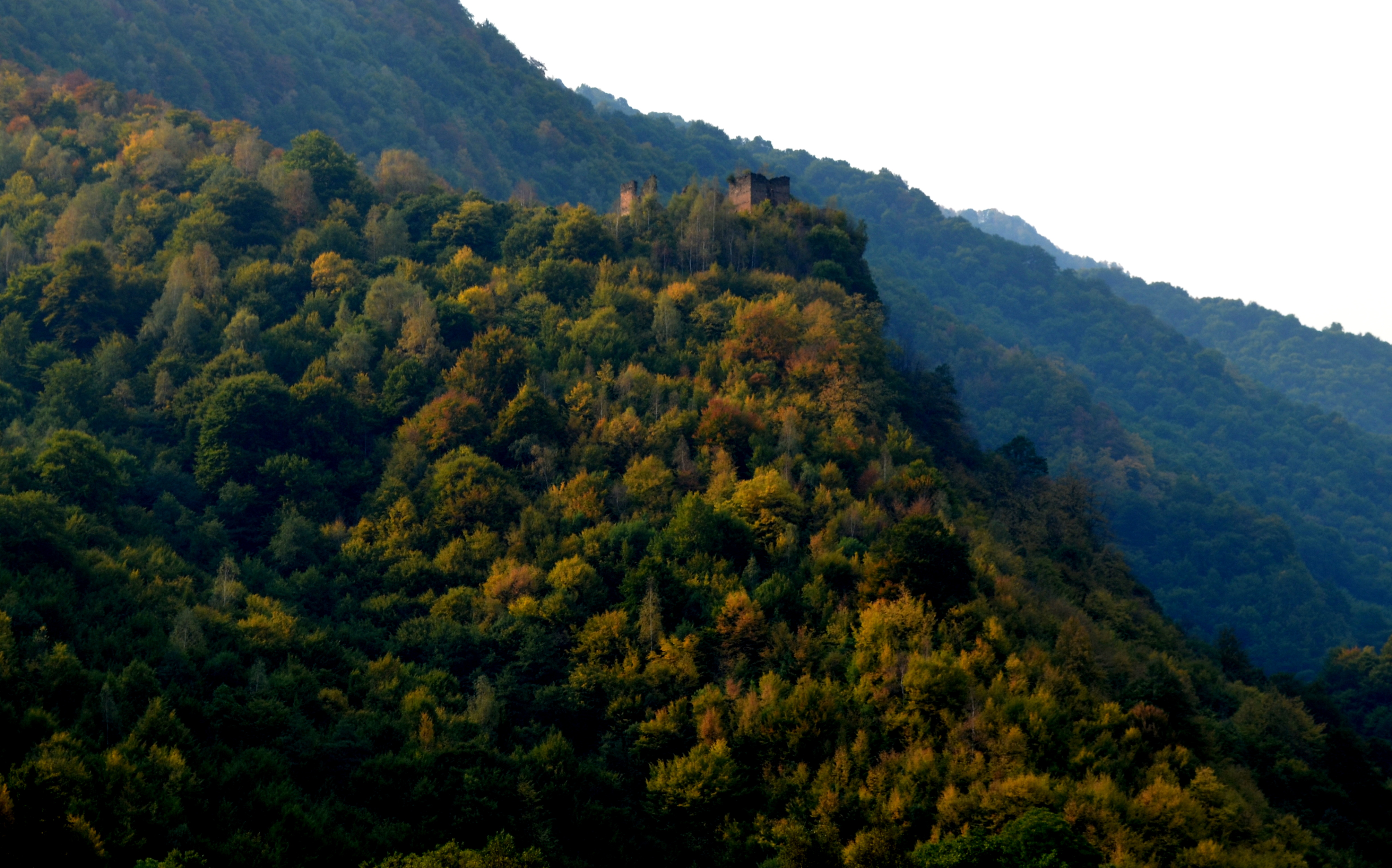 Cetatea Colț, Suseni, Hunedoara